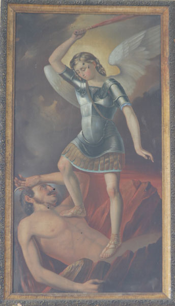 Арханёл Міхал. XIХ ст., г. Навагрудак, фарны касцёл